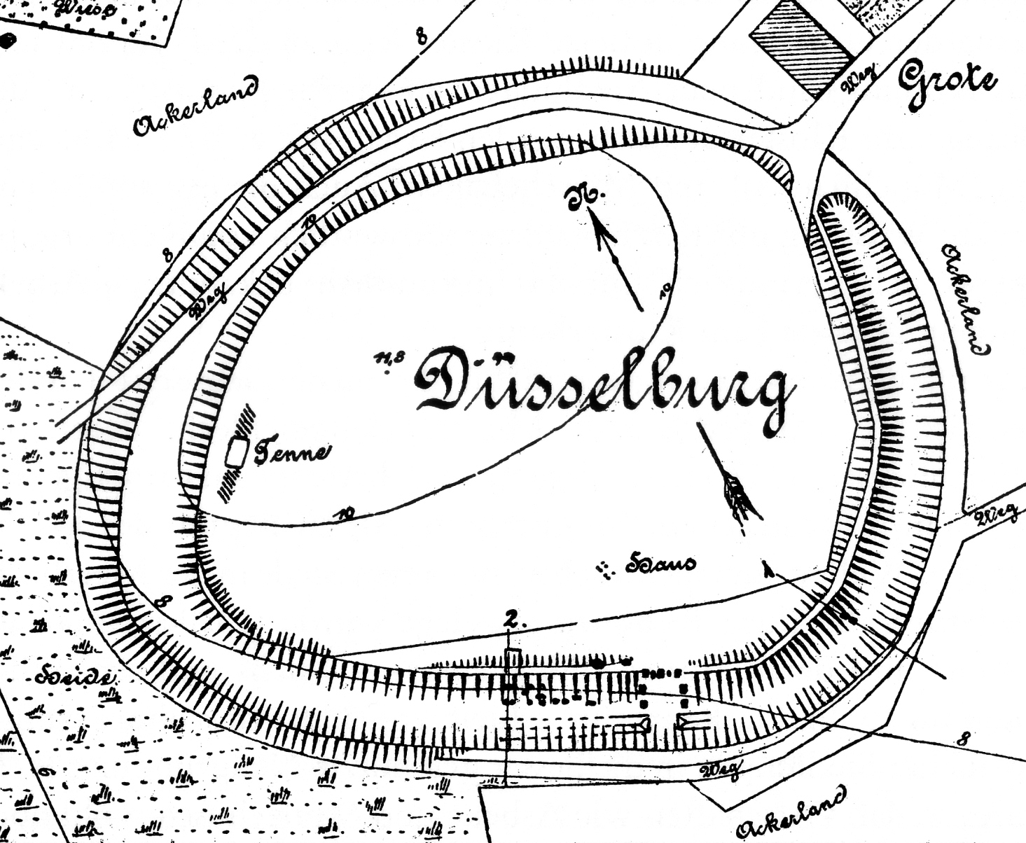 Lageplan der Düsselburg